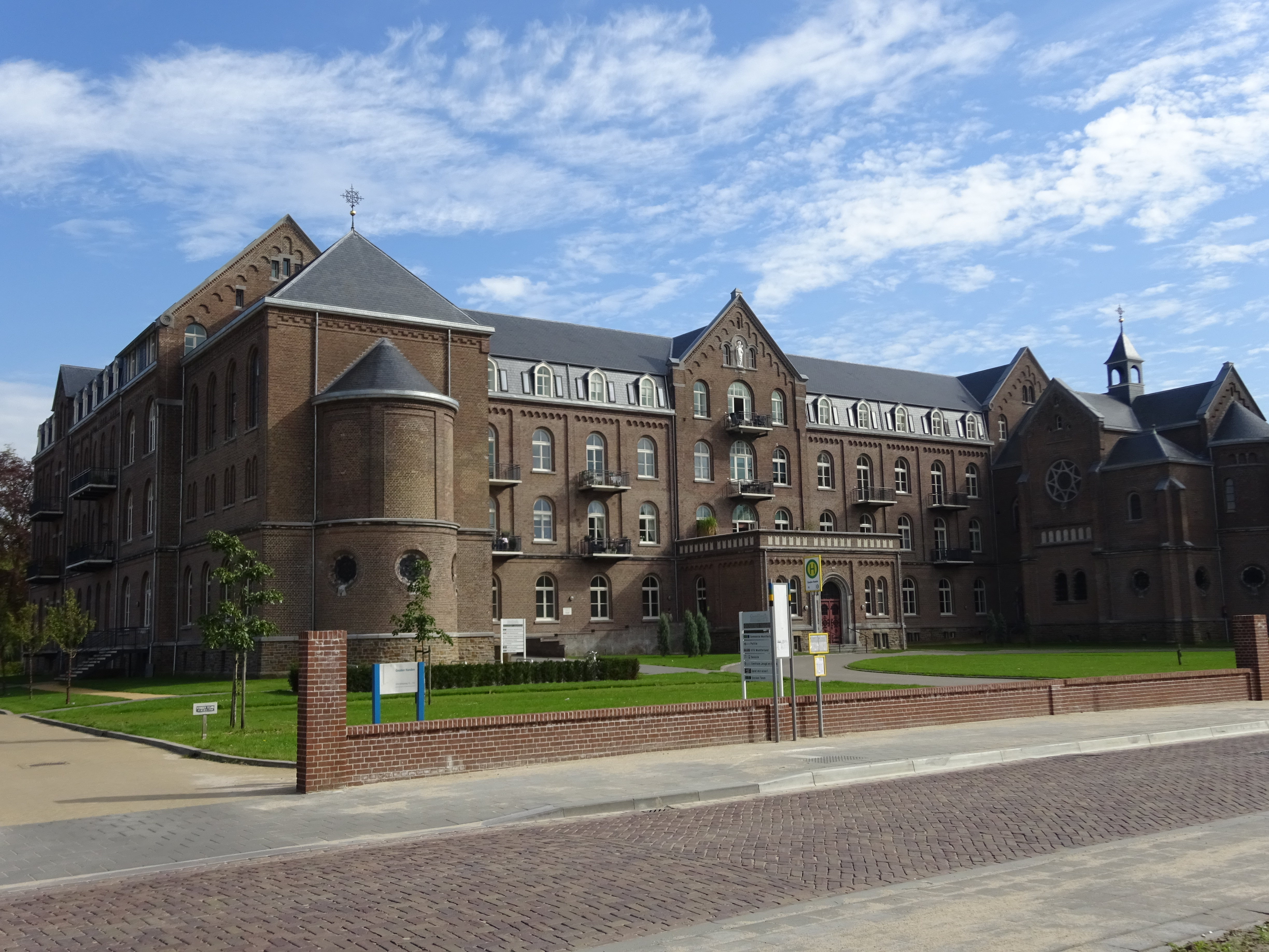 Wooncomplex Gouden Handen in voormalig klooster Don Rua, later: St. Bonifatius, in 's Heerenberg, 2015